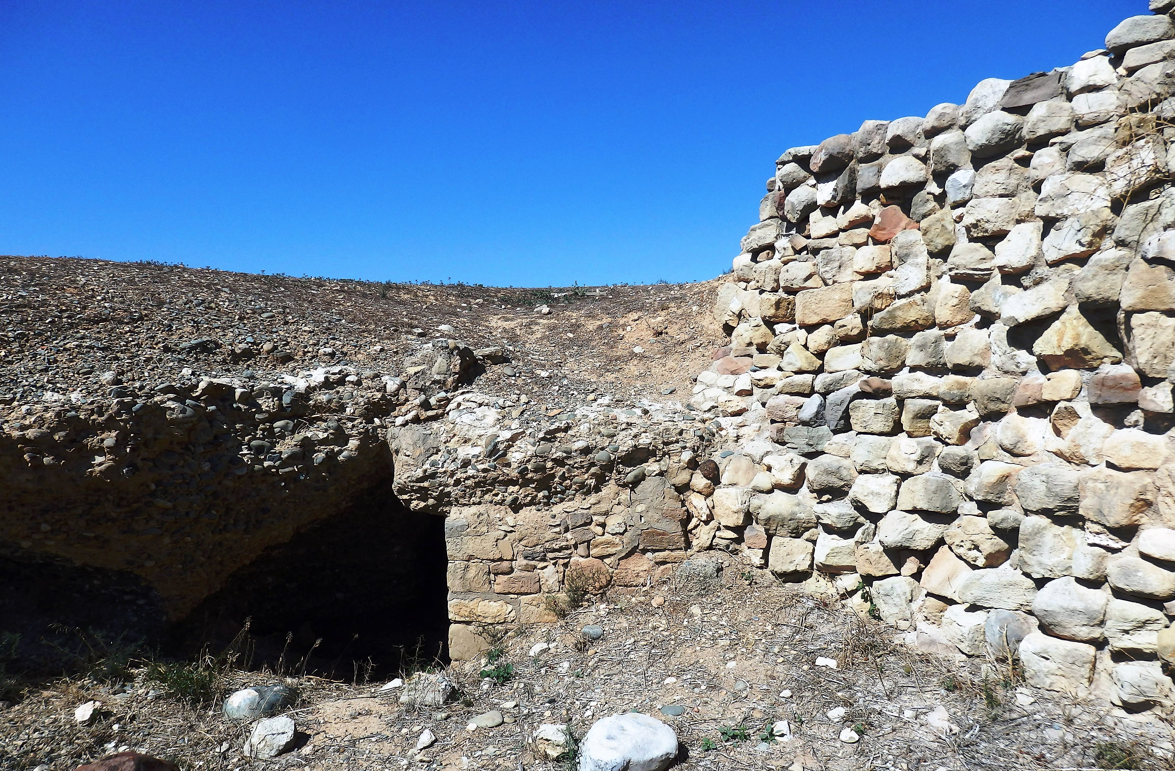 Tunneleingang